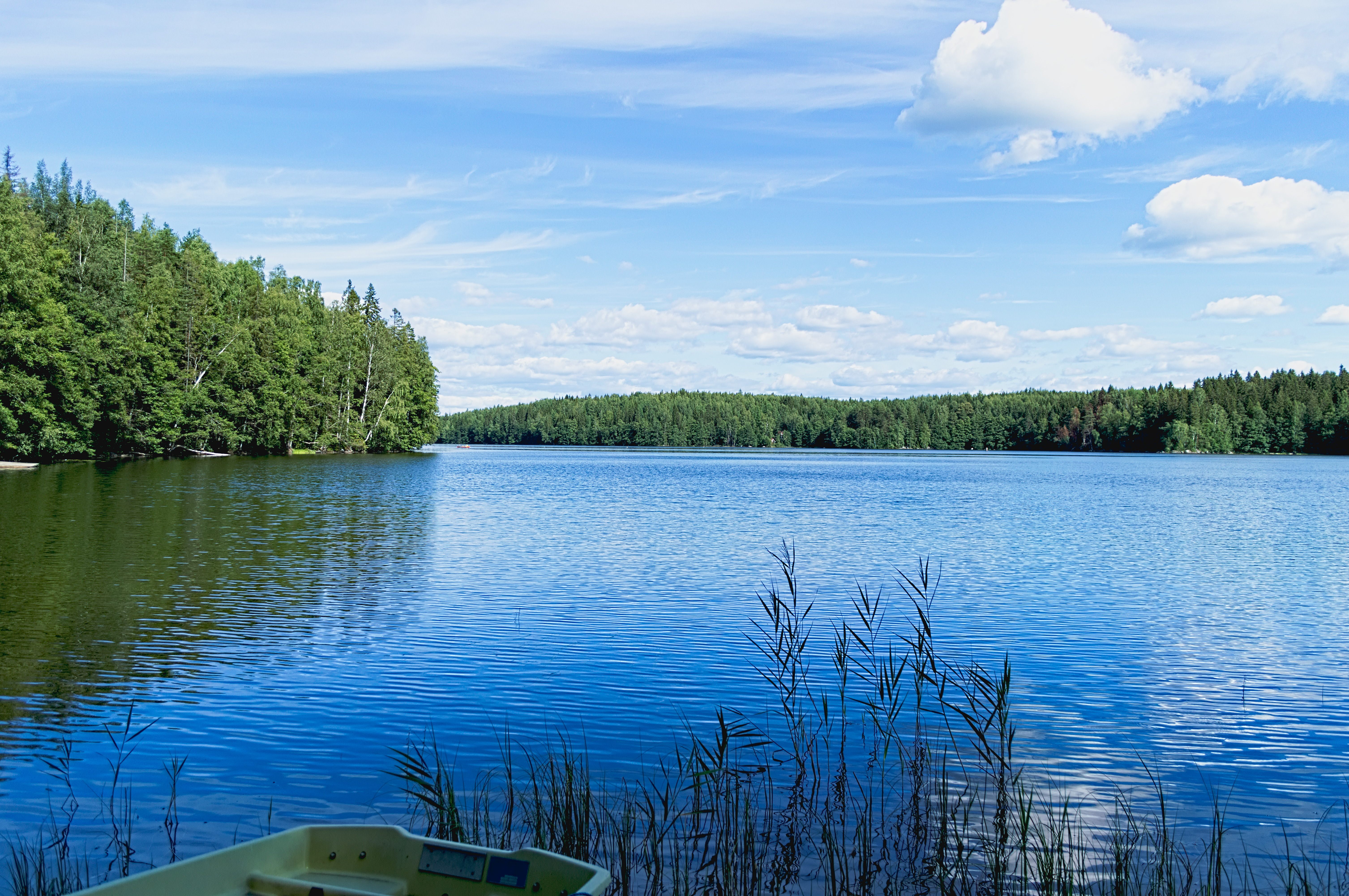 Lahdesjärveä sen lounaiskulmasta.